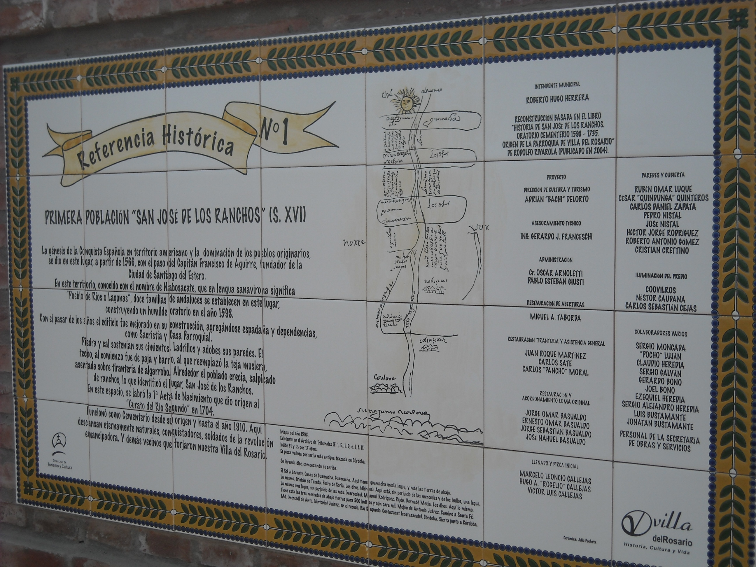 Reproducciòn de la primer planimetrìa de la provincia de Còrdoba (Argentina) que demostraba la presencia de asentamientos espanyoles en la zona del Nabosacat Sanaviròn en la segunda mitad del siglo 17